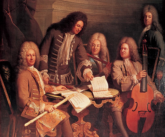 He escrito e investigado sobre esta religión que ha marcado la vida de muchas personas..